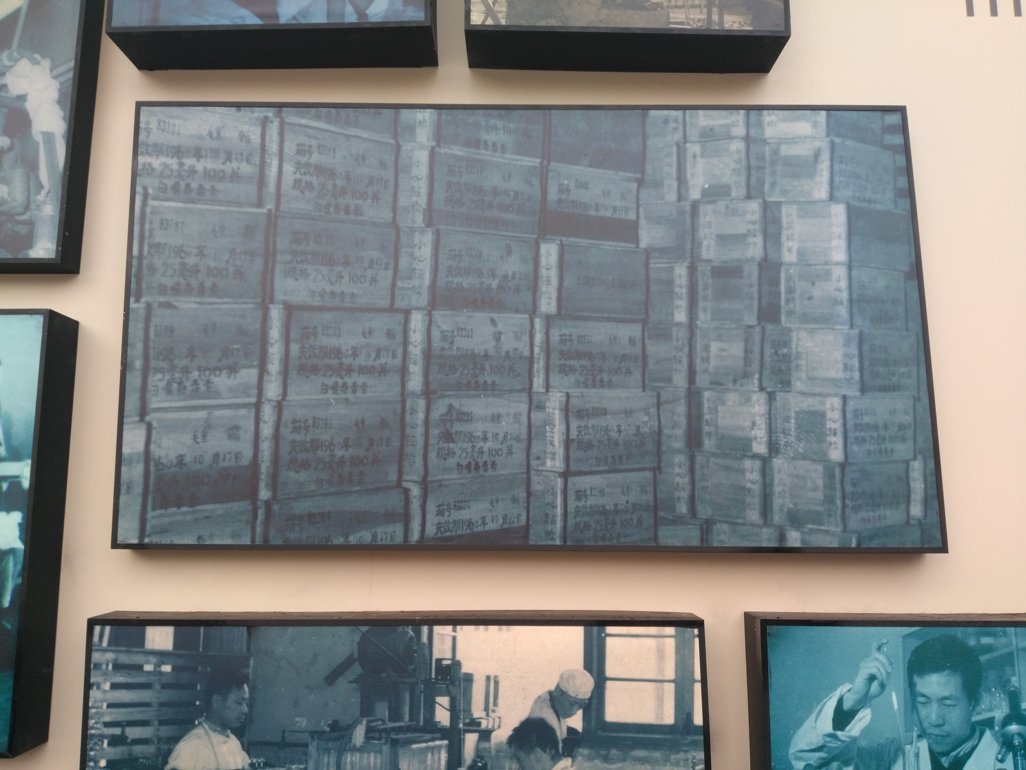 上生新所园区随拍。1960年，上海生物研究所的白喉疫苗仓库。为上海生物研究所员工的职务作品。